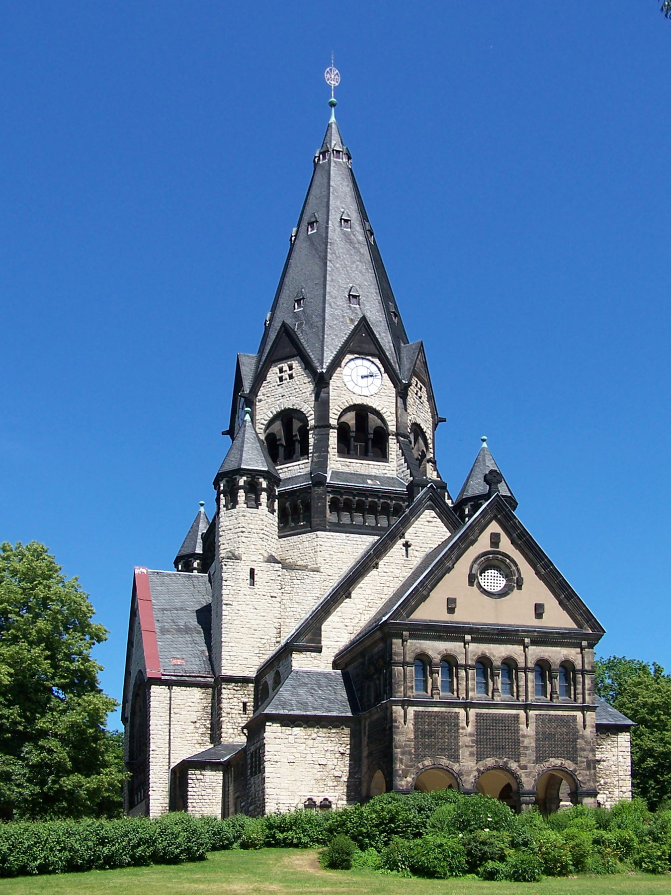 Die Lutherkirche in Chemnitz (erbaut 1902-1908), fotografiert am 23. Juni 2005